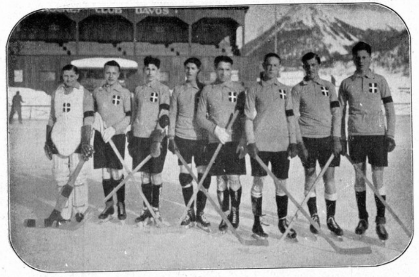 La nazionale di Hockey su ghiaccio ai campionati europei del 1926